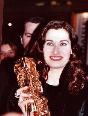 Emmanuelle Devos à la cérémonie des Césars.